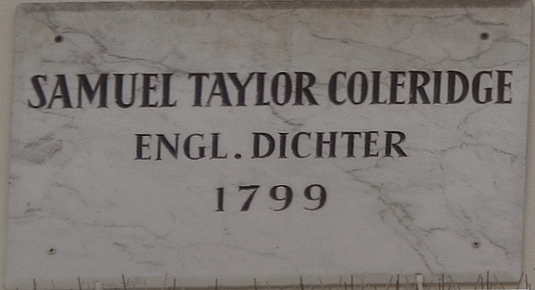 Göttinger Gedenktafel für Samuel Taylor Coleridge (Weender Straße 64)